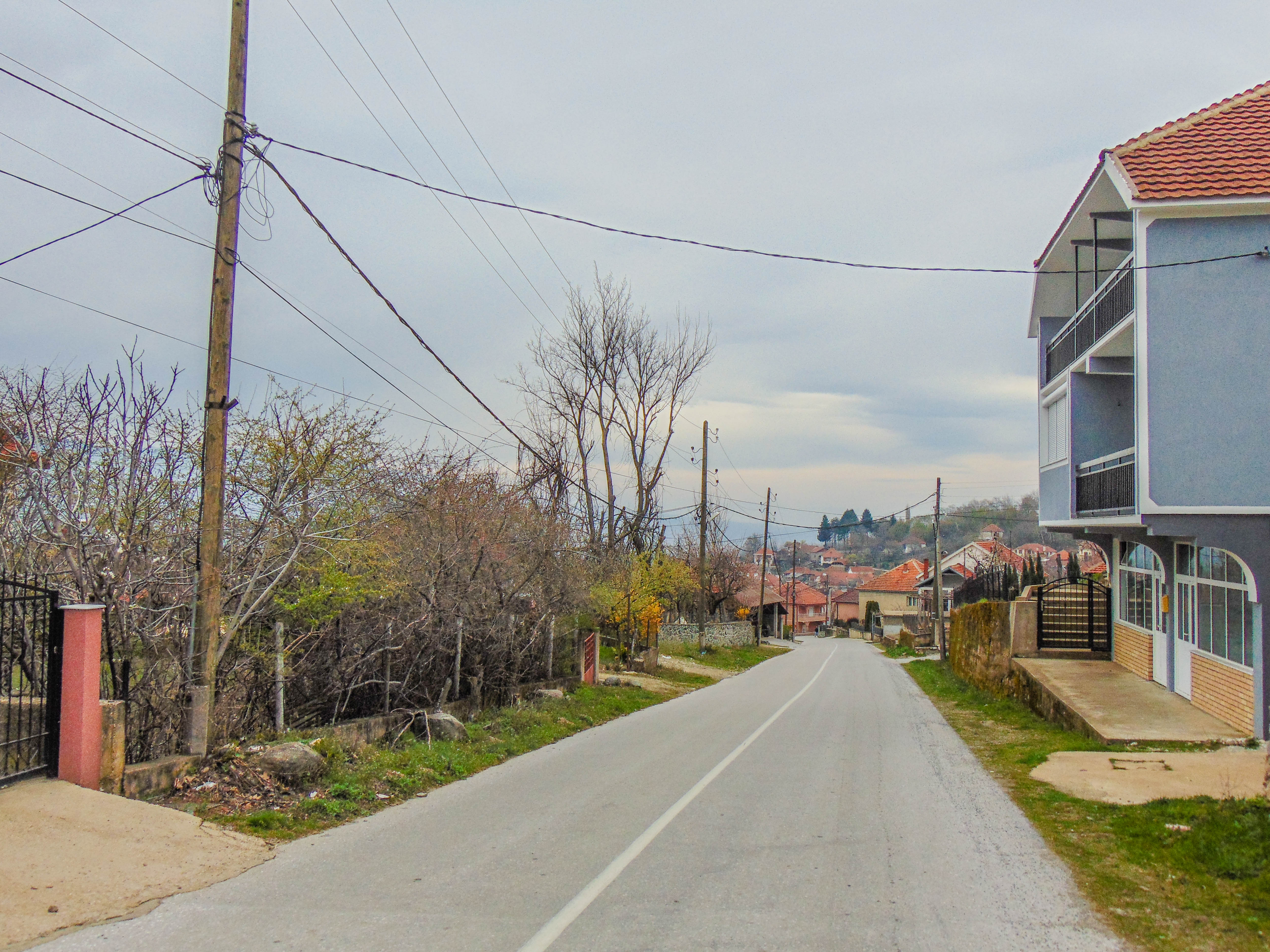 Мокрино